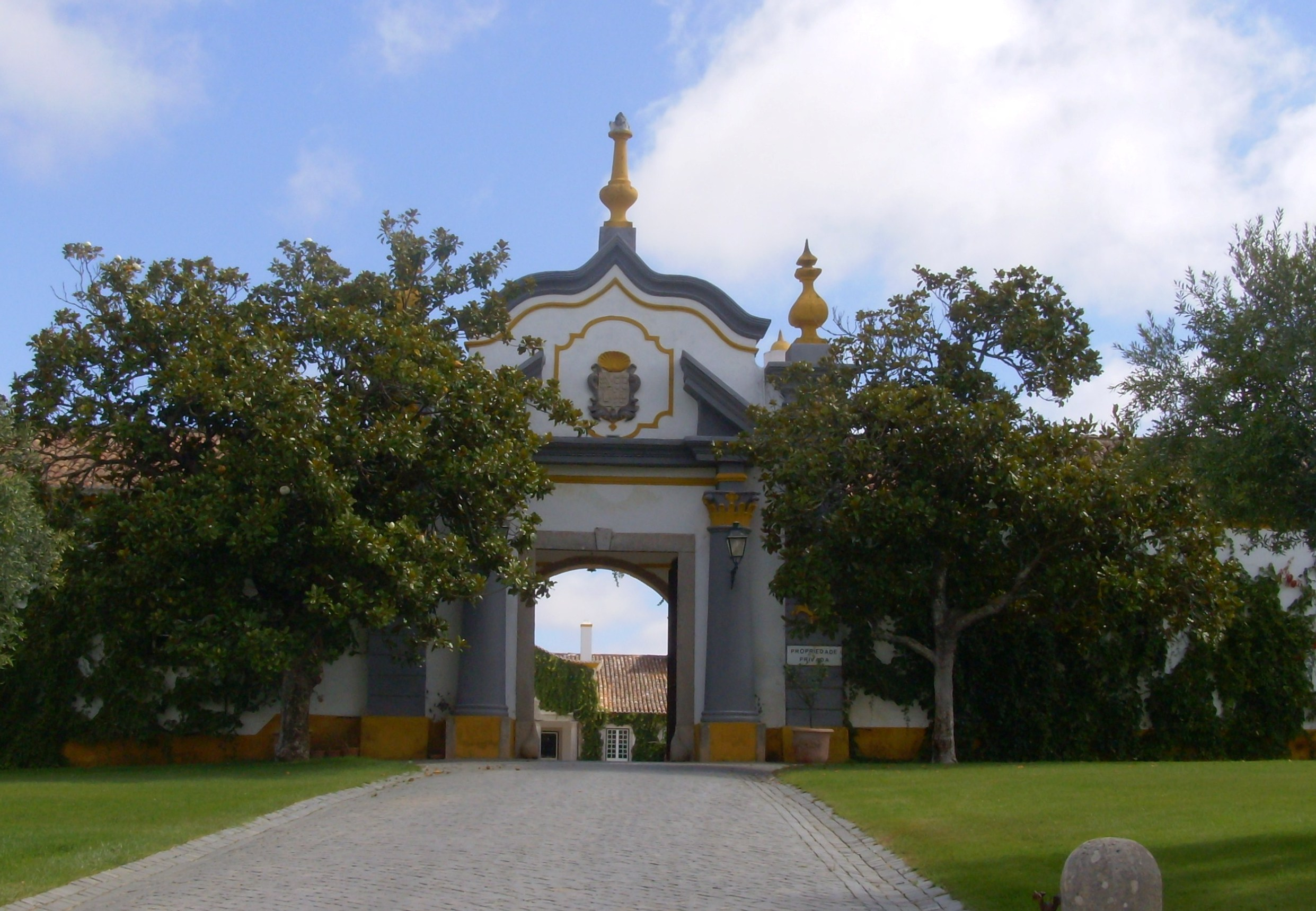 Quinta dos Loridos, freguesia do Carvalhal, concelho do Bombarral, distrito de Leiria, Portugal: portão.